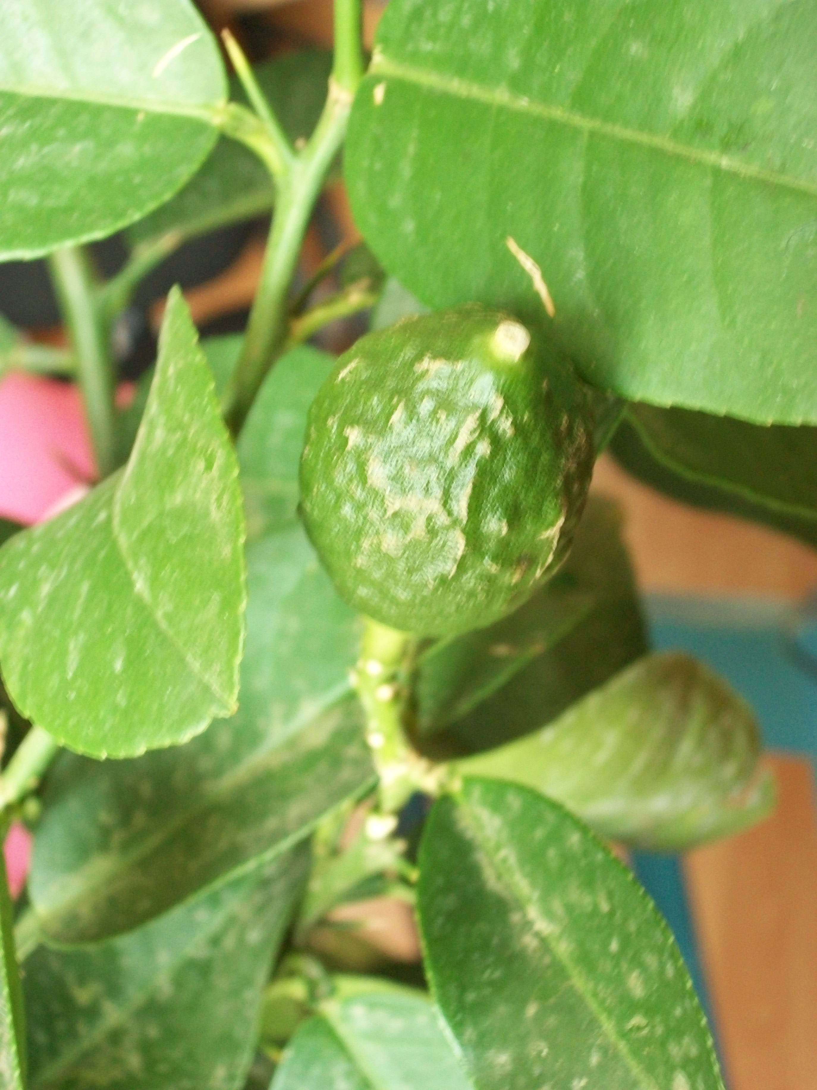 Voici le fruit